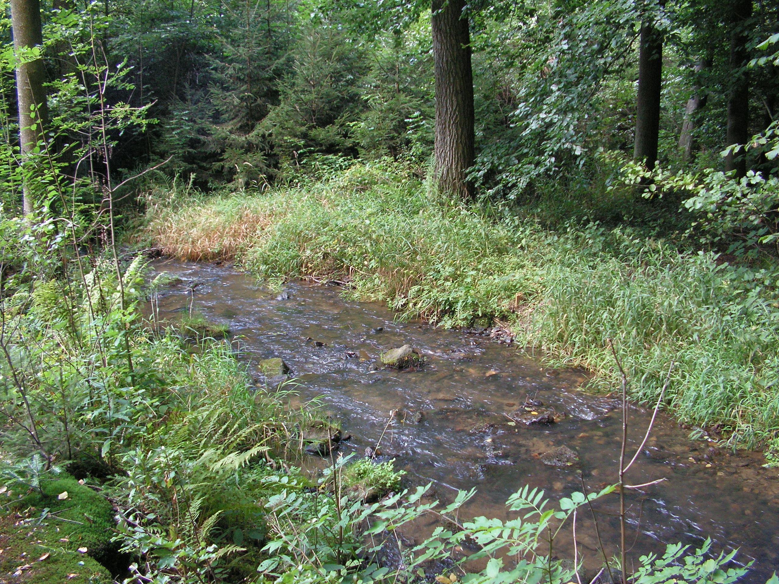 Zbožský potok, levostranný přítok říčky Sázavky. Foceno nedaleko Josefodolu.